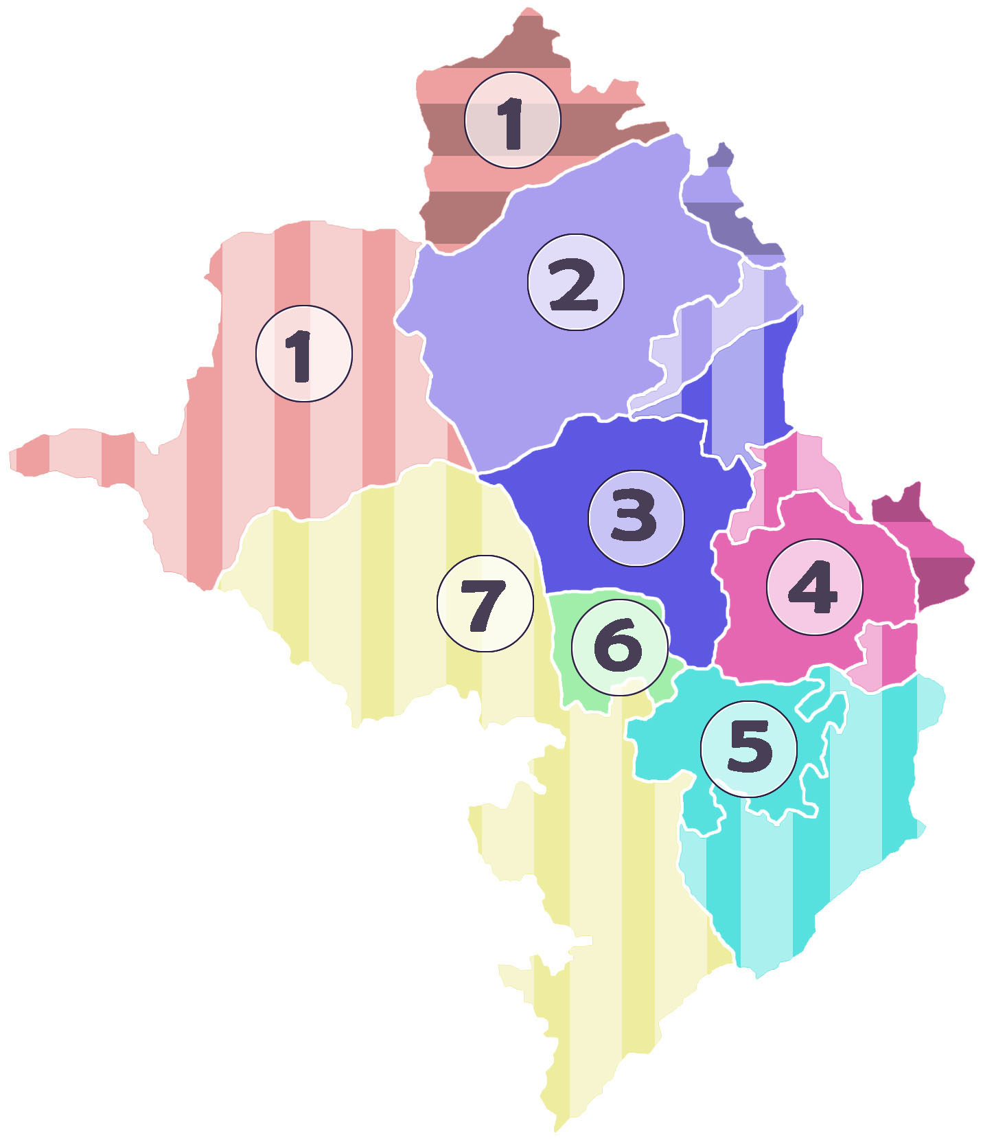 Gewesten van de republiek Nagorno-Karabach